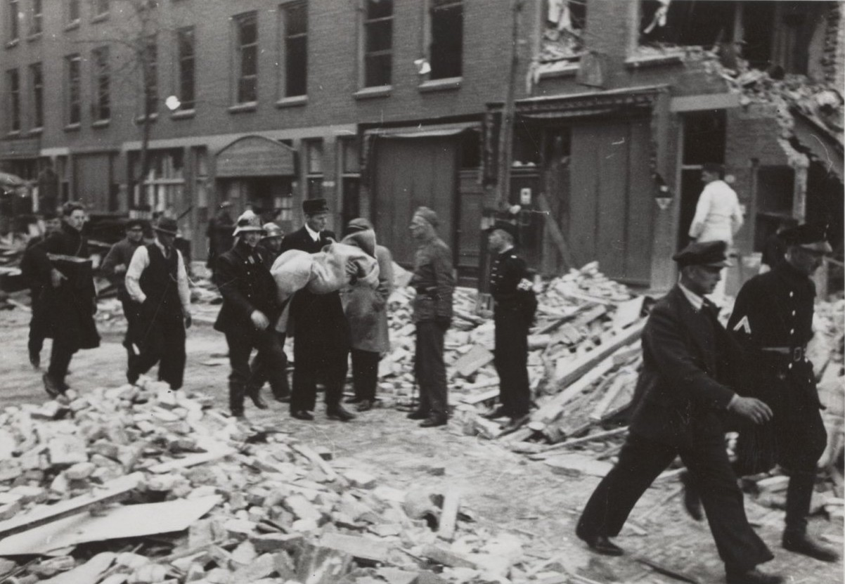 Gevolgen geallieerd bombardement op Rotterdam op 31 maart 1943. Het 50 uur lang onder de puinhopen begraven 3-jarig kind kan worden gered. Het overbrengen naar een ziekenhuis door de Geneeskundige Dienst.